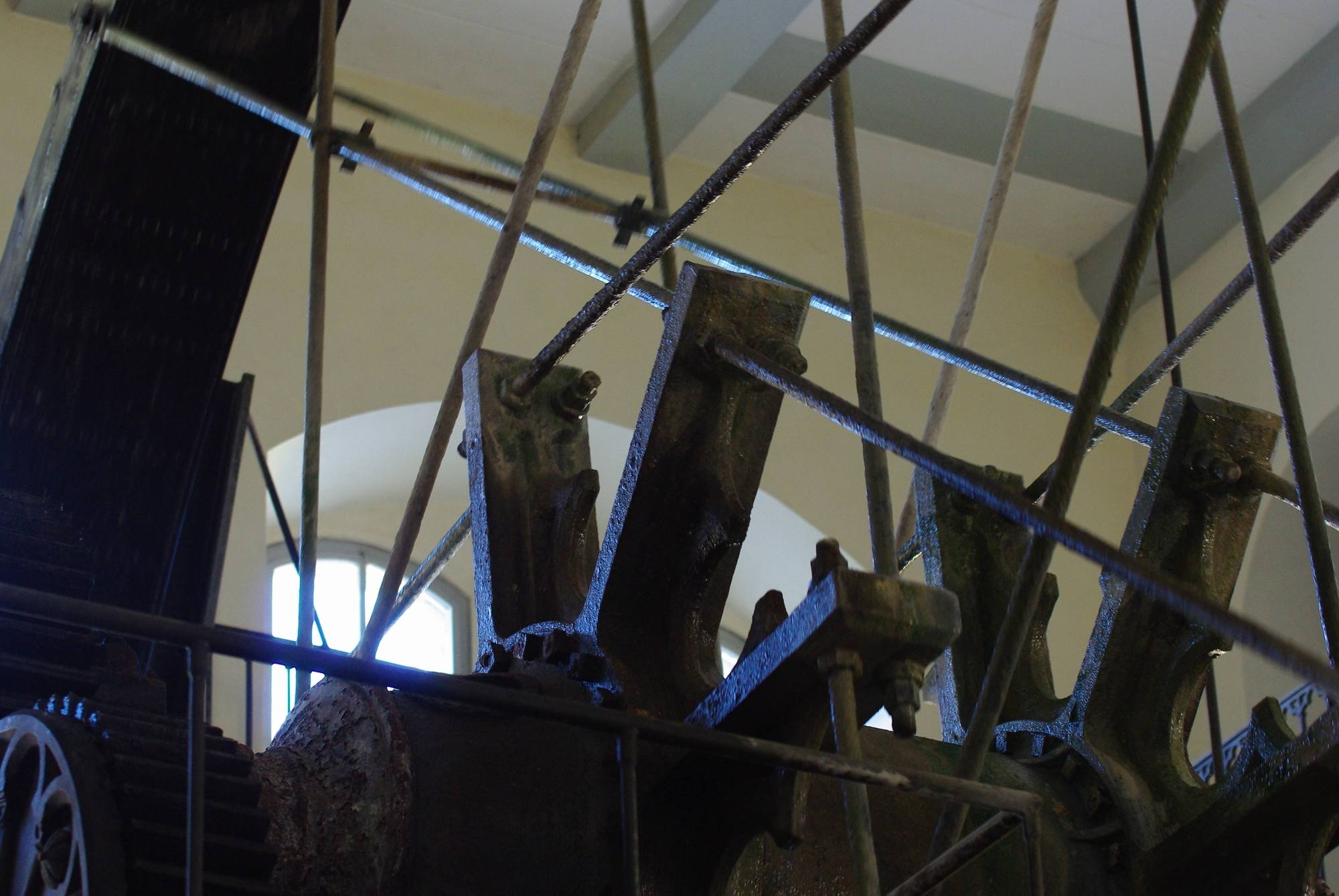 Alte Saline in 83435 Bad Reichenhall, Maschinenhalle im Hauptbrunnhaus; Detail der Speichen der Wasserräder This is a photograph of an architectural monument.